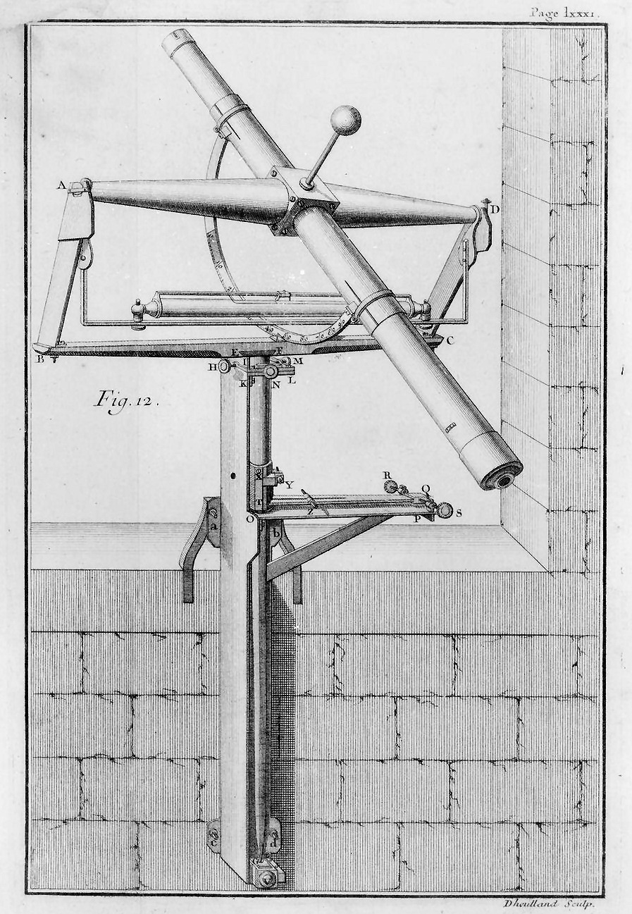 Lunette méridienne ou instrument des passages.